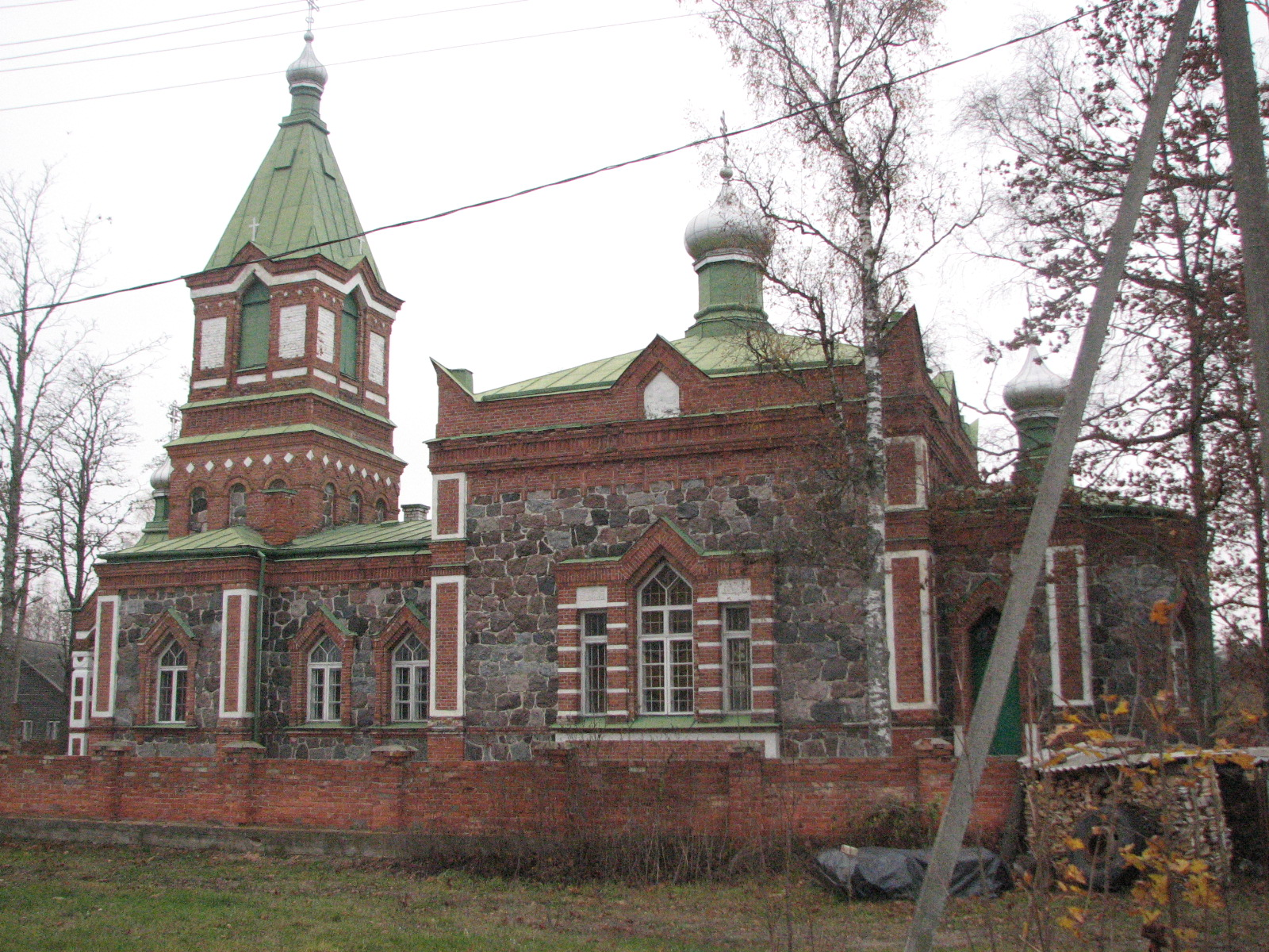 Lohusuu, Estonia